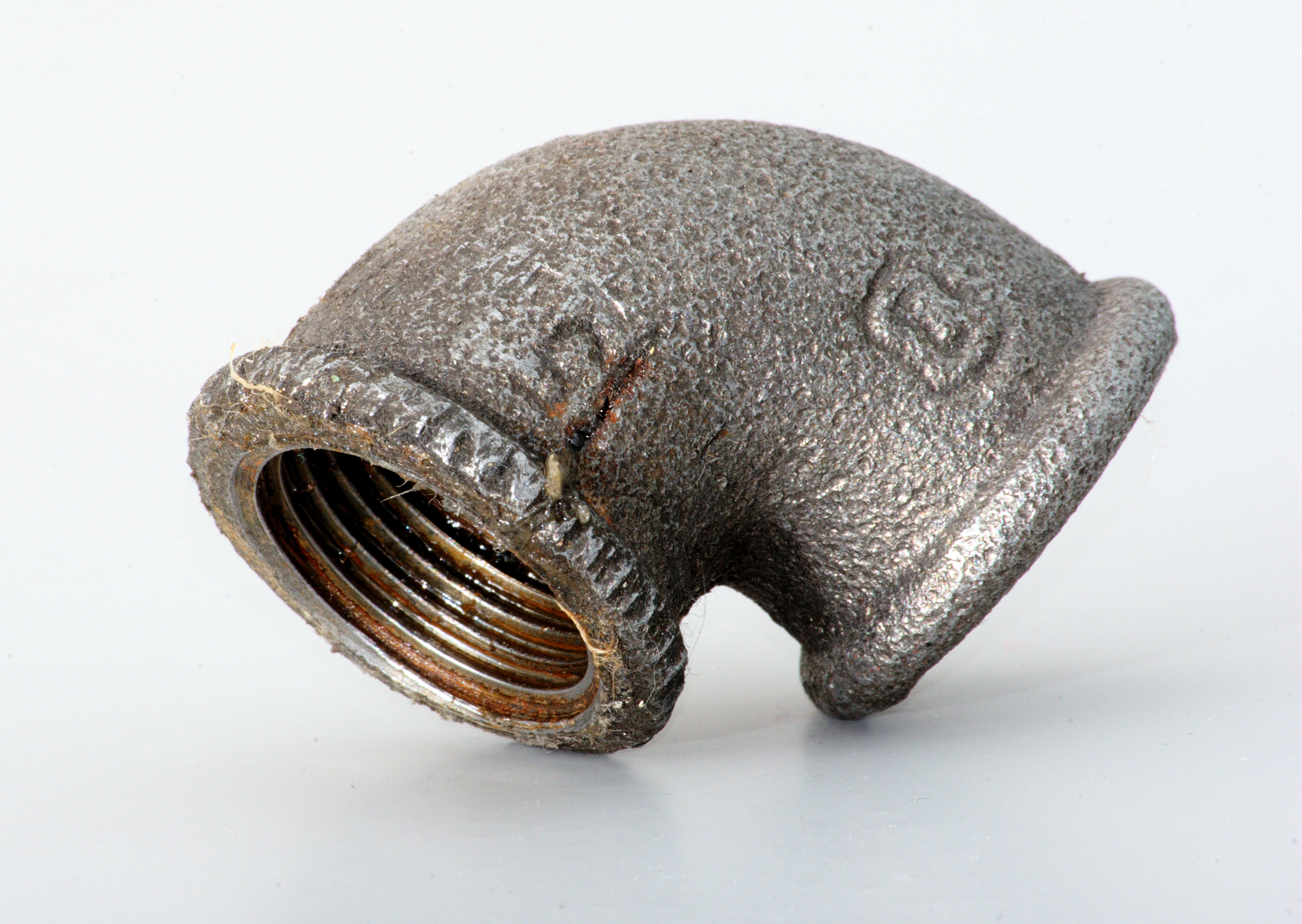 Verzinkter 90°-Schraubrohrfitting aus schwarzem Temperguss (GJMB).